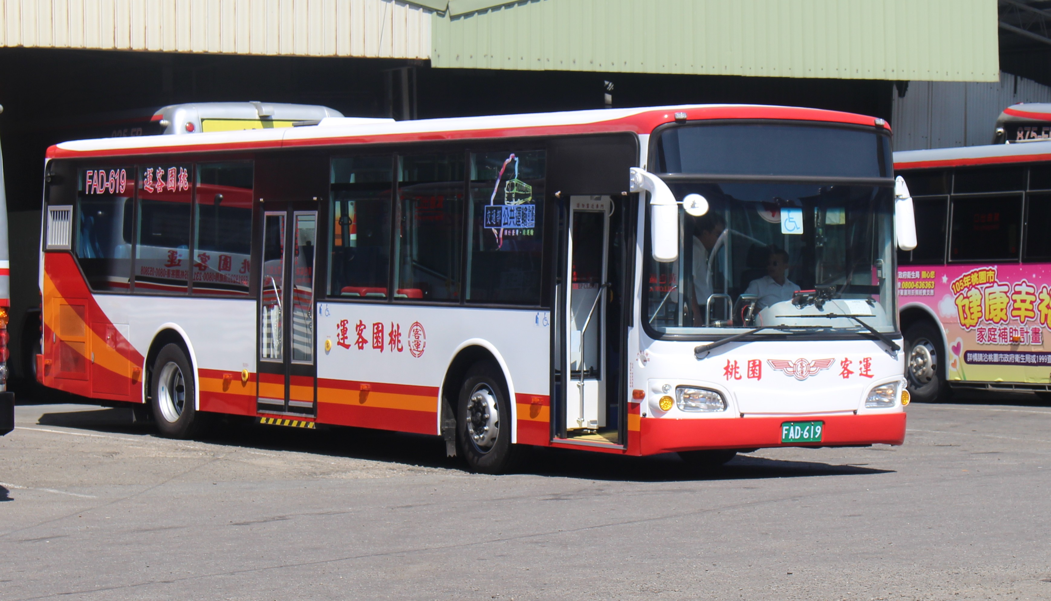 桃園客運2016年日野HS8JRVL-UTF低地板公車FAD-619，固亞車體。